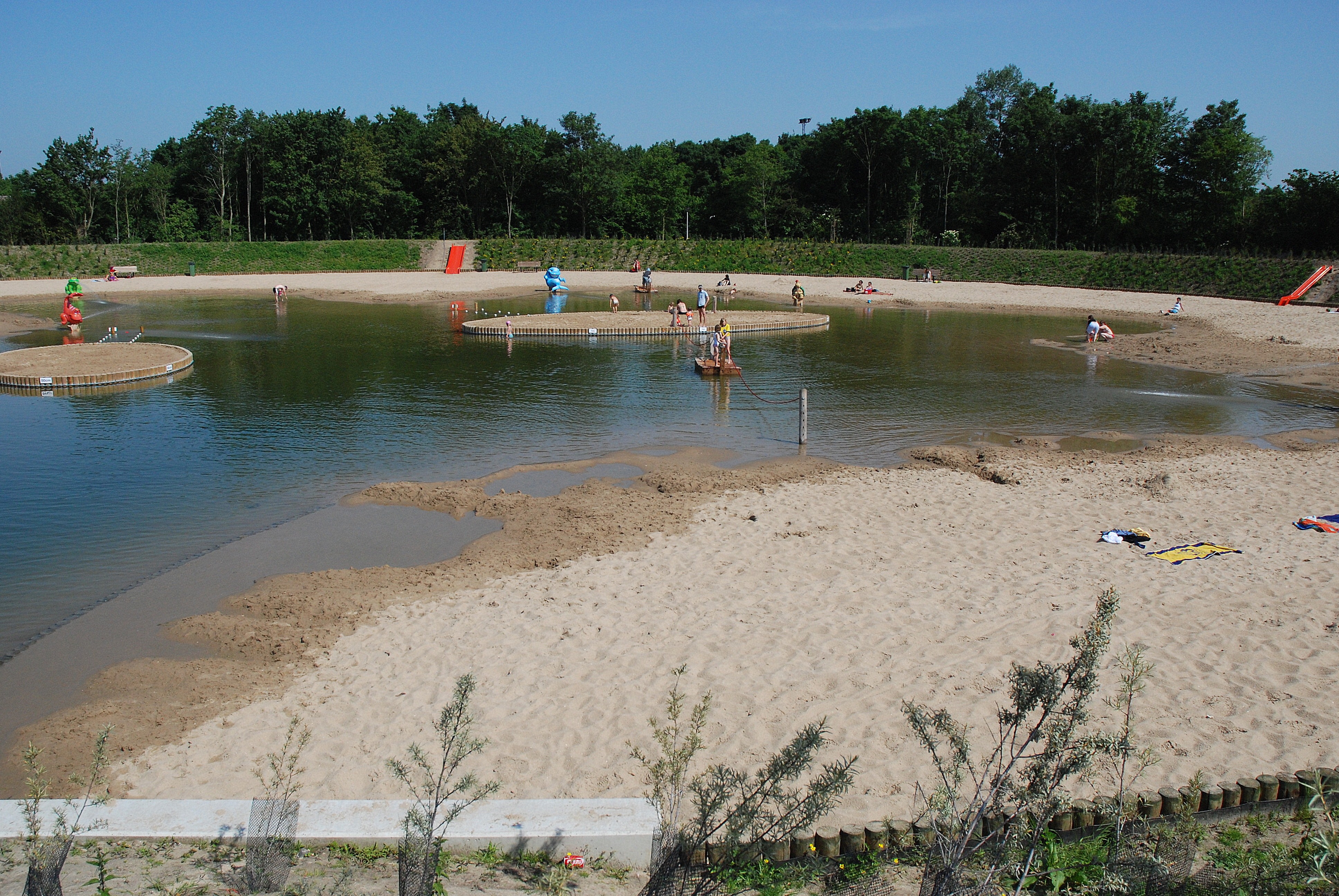 Blaarmeersen te Gent, België